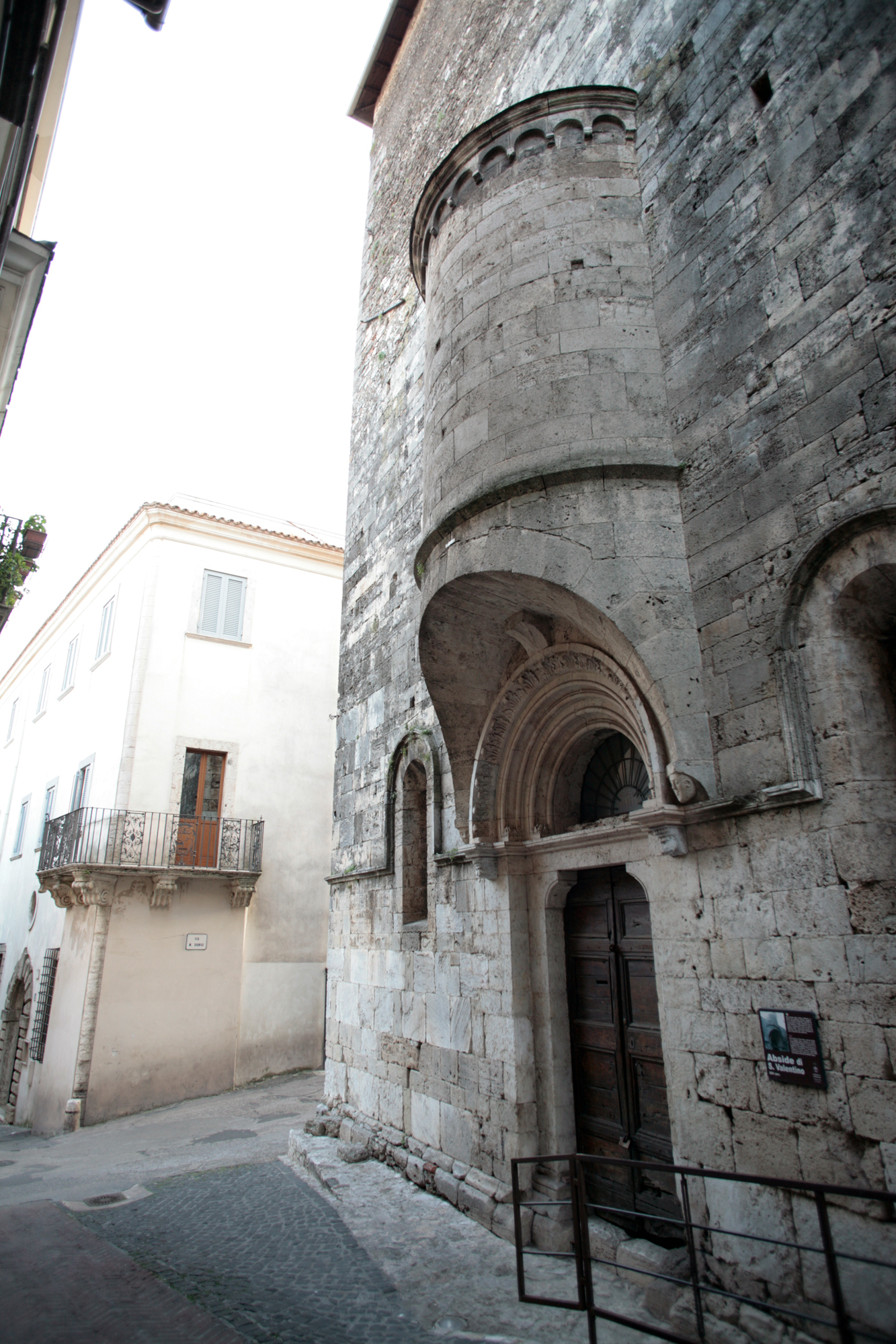 Abside di San Valentino - Ferentino XIII sec.